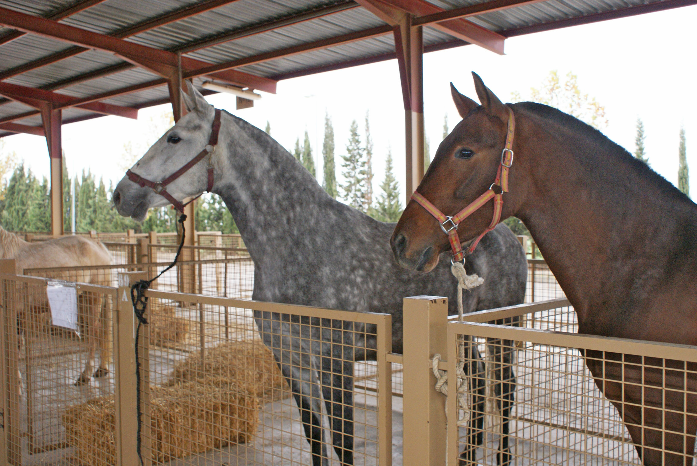 Algunos ejemplares durante la feria de ganado celebrada en el año 2011